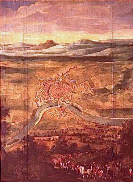 Reddition_de_la_ville_de_Montauban_par Louis XIII et le cardinal de Richelieu accompagné du duc de Montmorency, du marquis d'Effiat et du vicomte d'Arpajon le 21 août 1629, Galerie du Château de Richelieu